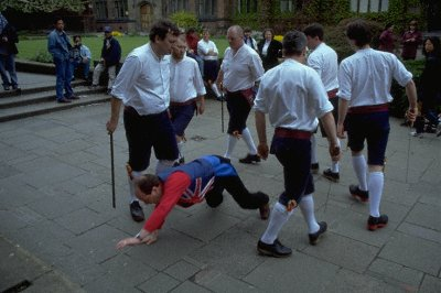 Newcastle Kingsmen beim Aufführen des Grenosider Kettenschwerttanzes (siehe Long Sword Dance), Mai 1999. Diese Figur ist die symbolhafte "Hinrichtung" des Hauptmanns, die Tod und Wiedergeburt darstellt.